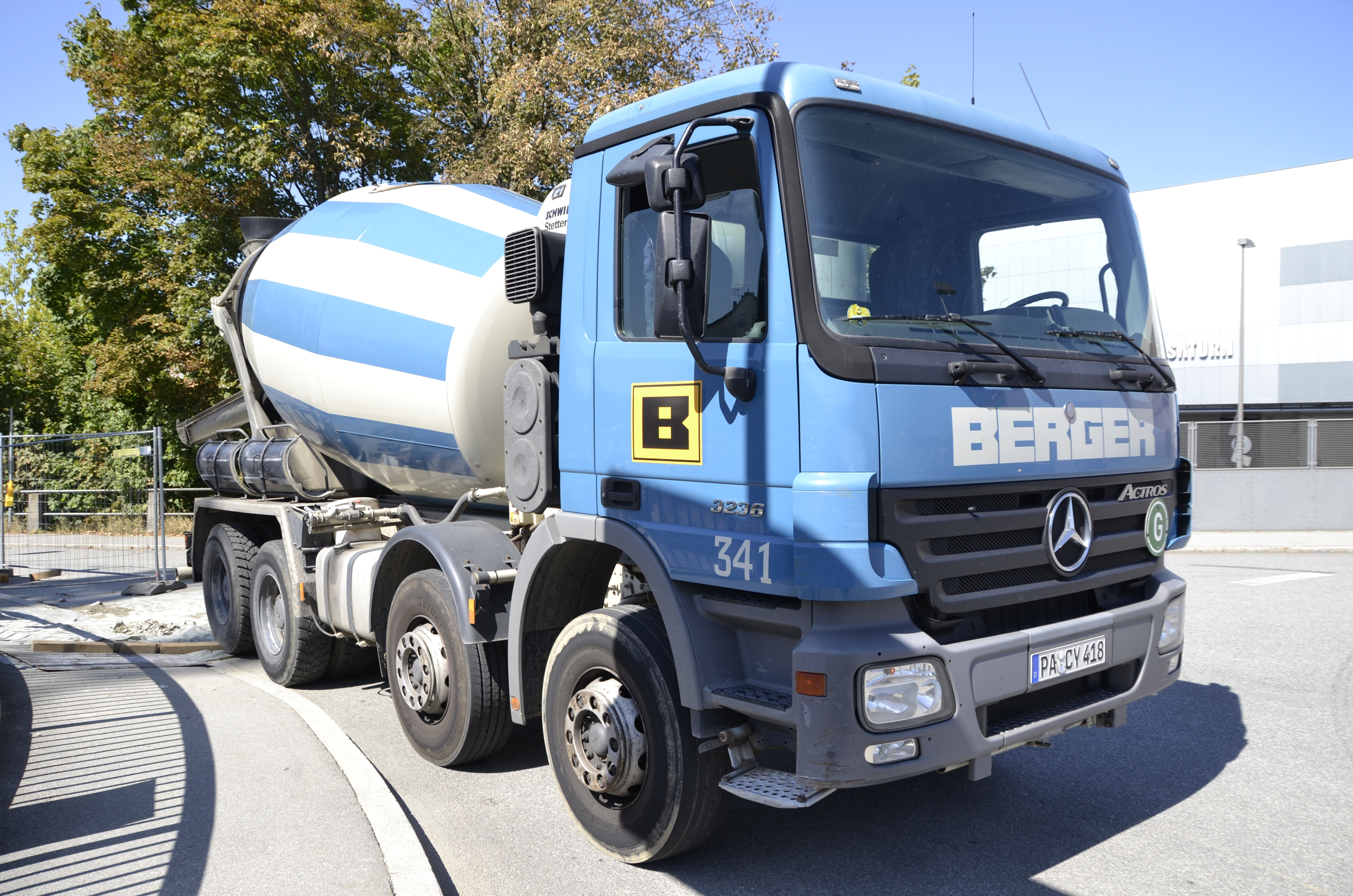 Mercedes-Benz-Actros-based (Type 3236) Betonmischer-LKW in Passau des Bauunternehmens Berger.